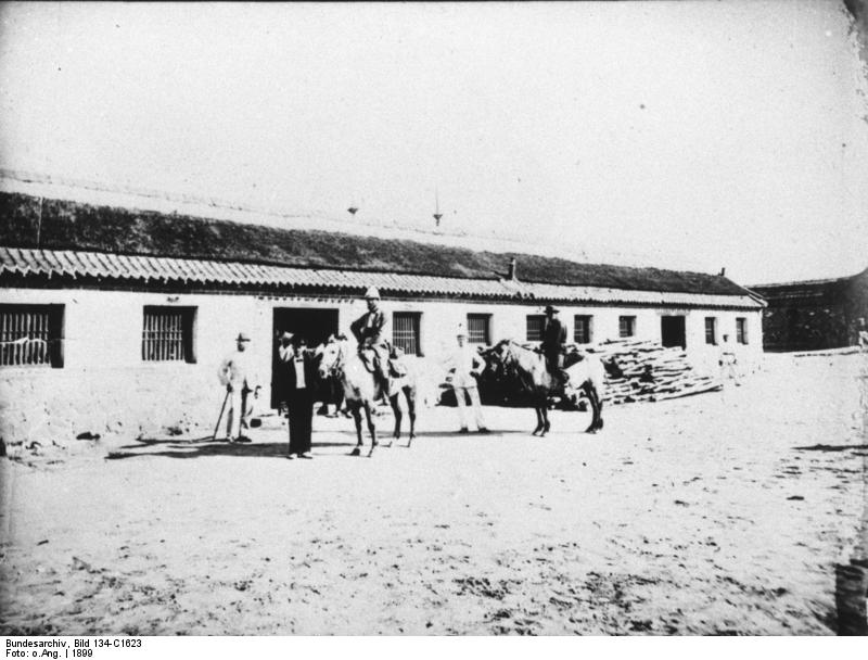 Schutzgebiet Kiautschou Tsingtau 1899: Alte Bank